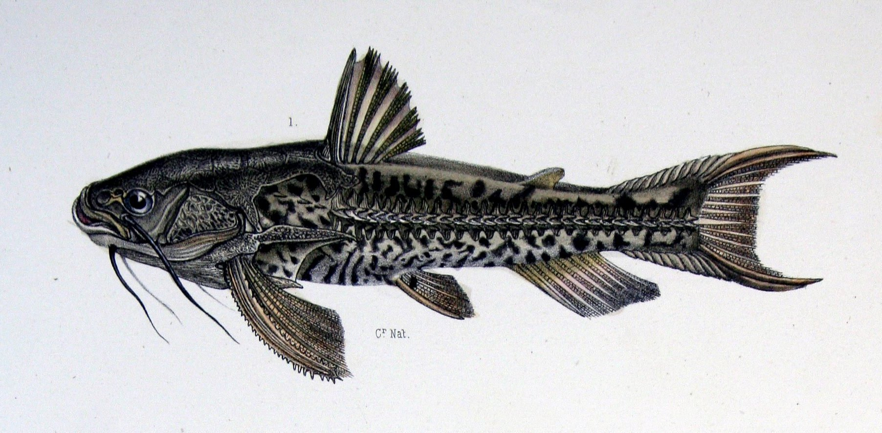 Doras weddellii Cast. = Anadoras weddellii (Castelnau, 1855)